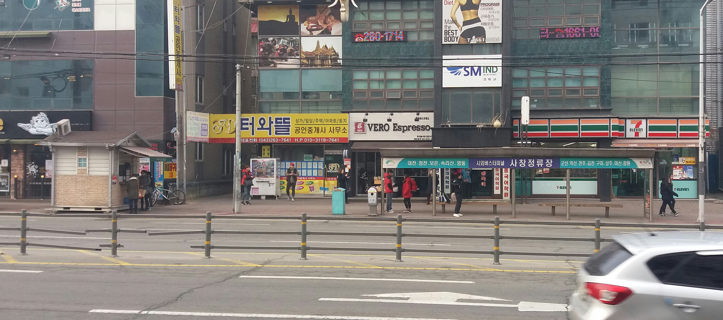 청주사창정류소